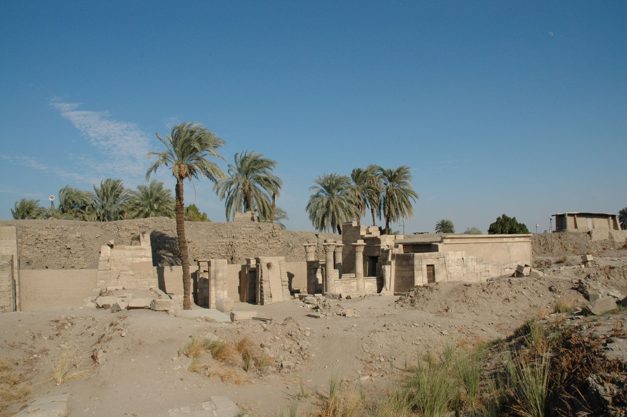 Tempio di Karnak: ruderi